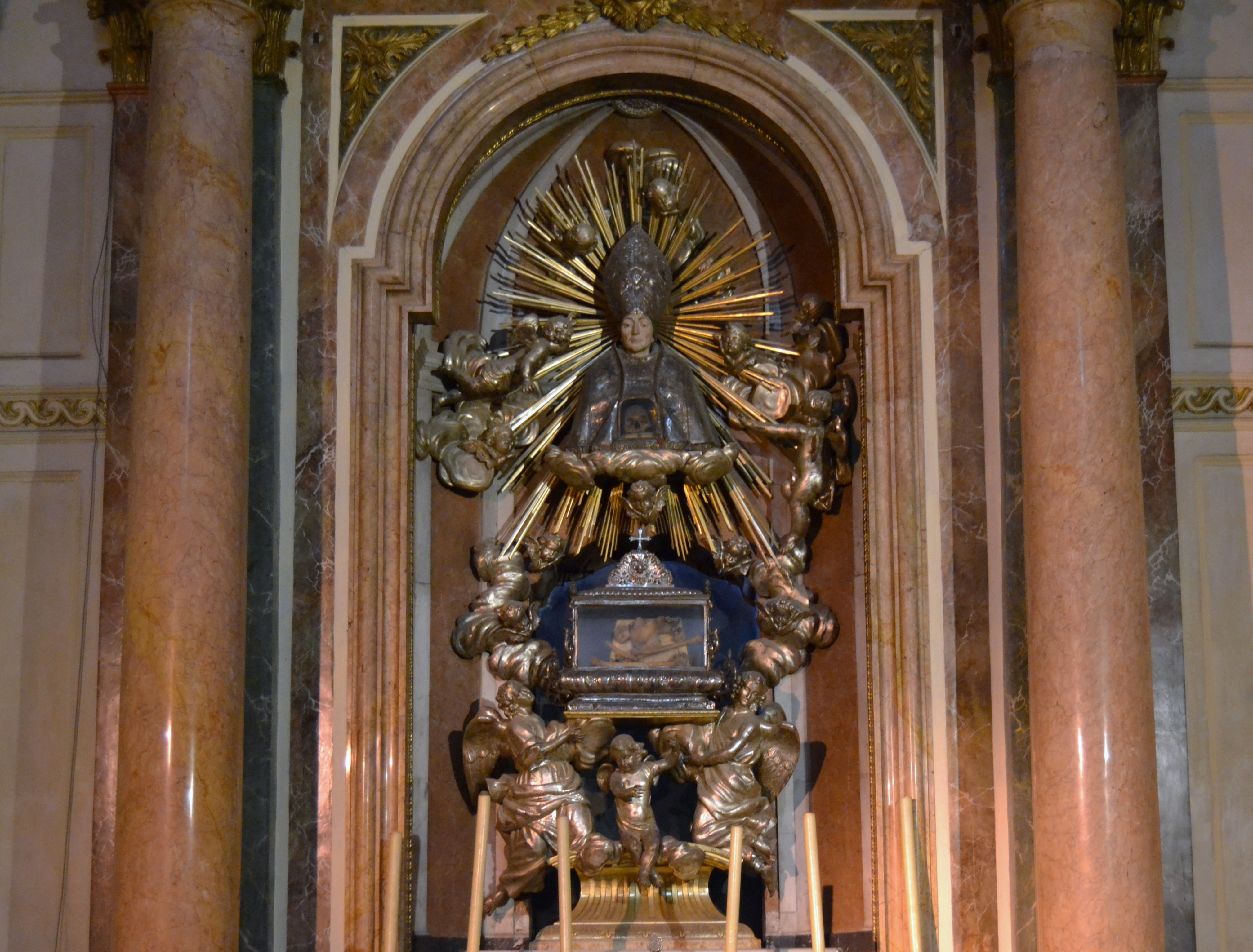 Capella de Sant Tomàs de Villanueva, reliquiari (catedral de València).